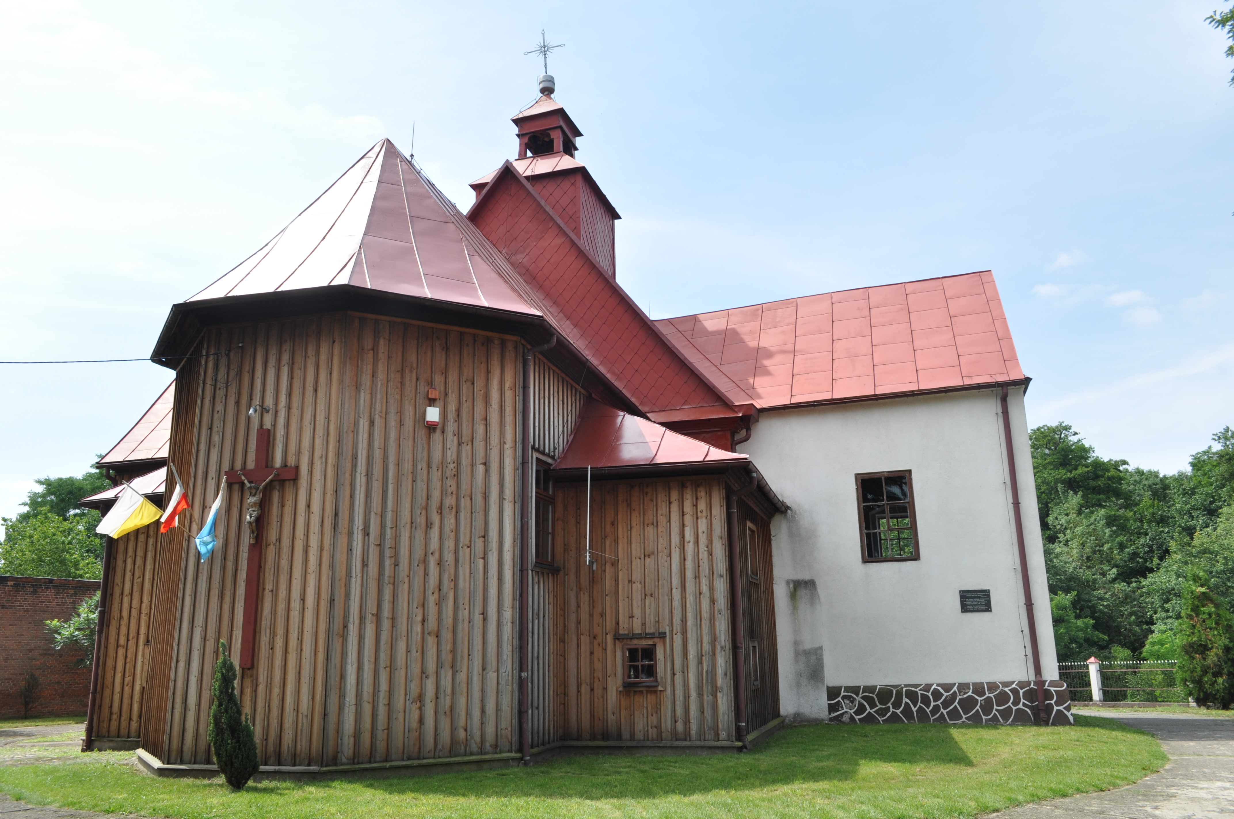 Golina, kościół par. p.w. św. Jakuba, 1765-1767